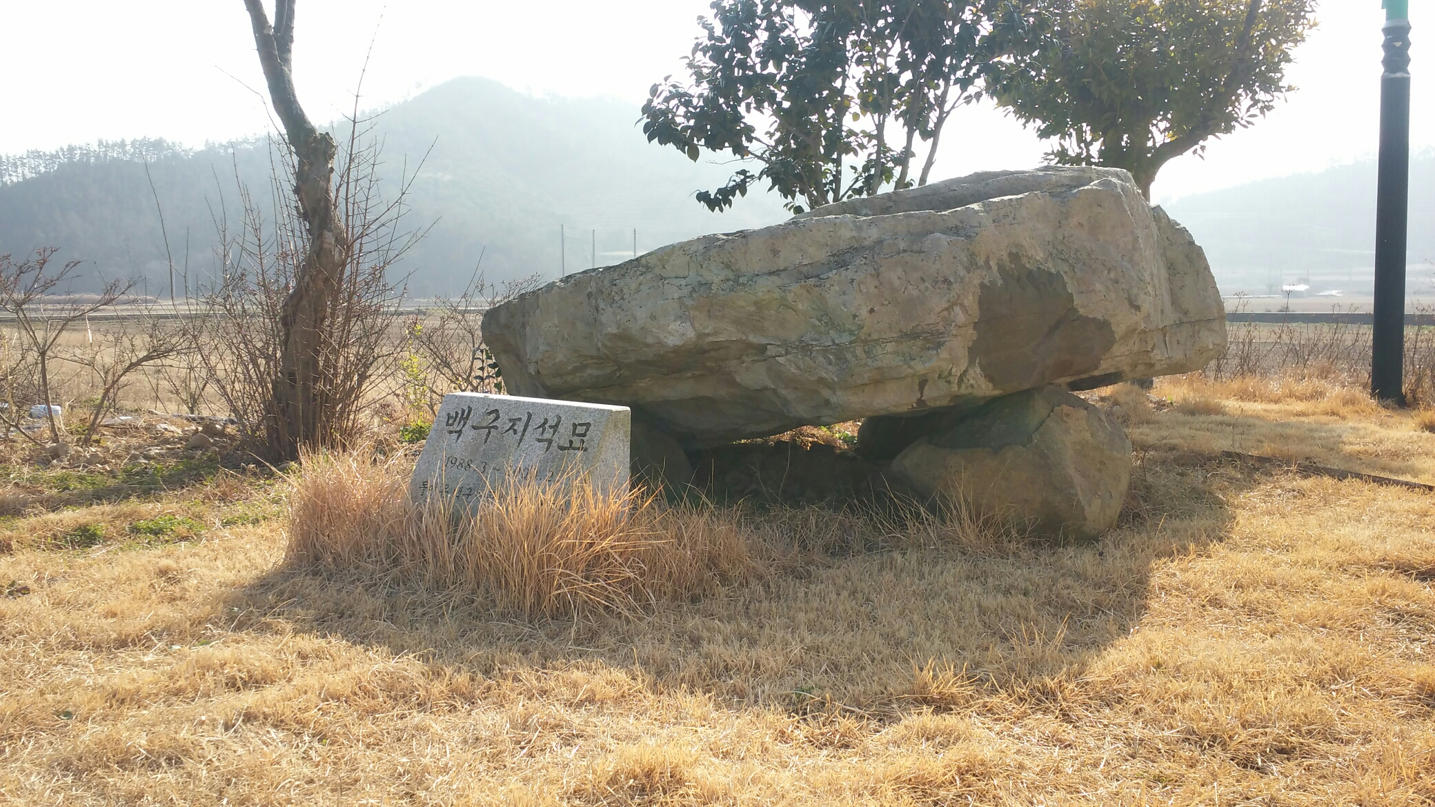 '돌아온 백구'의 지석묘. 전라남도 진도군에 위치해있다.